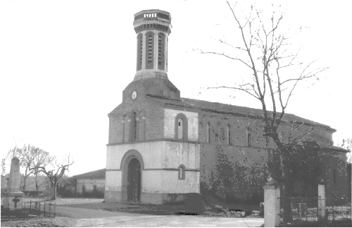 Photo personelle de l'église de Lautignac 31370 Bouchard.daniel 16:24, 4 December 2006 (UTC)